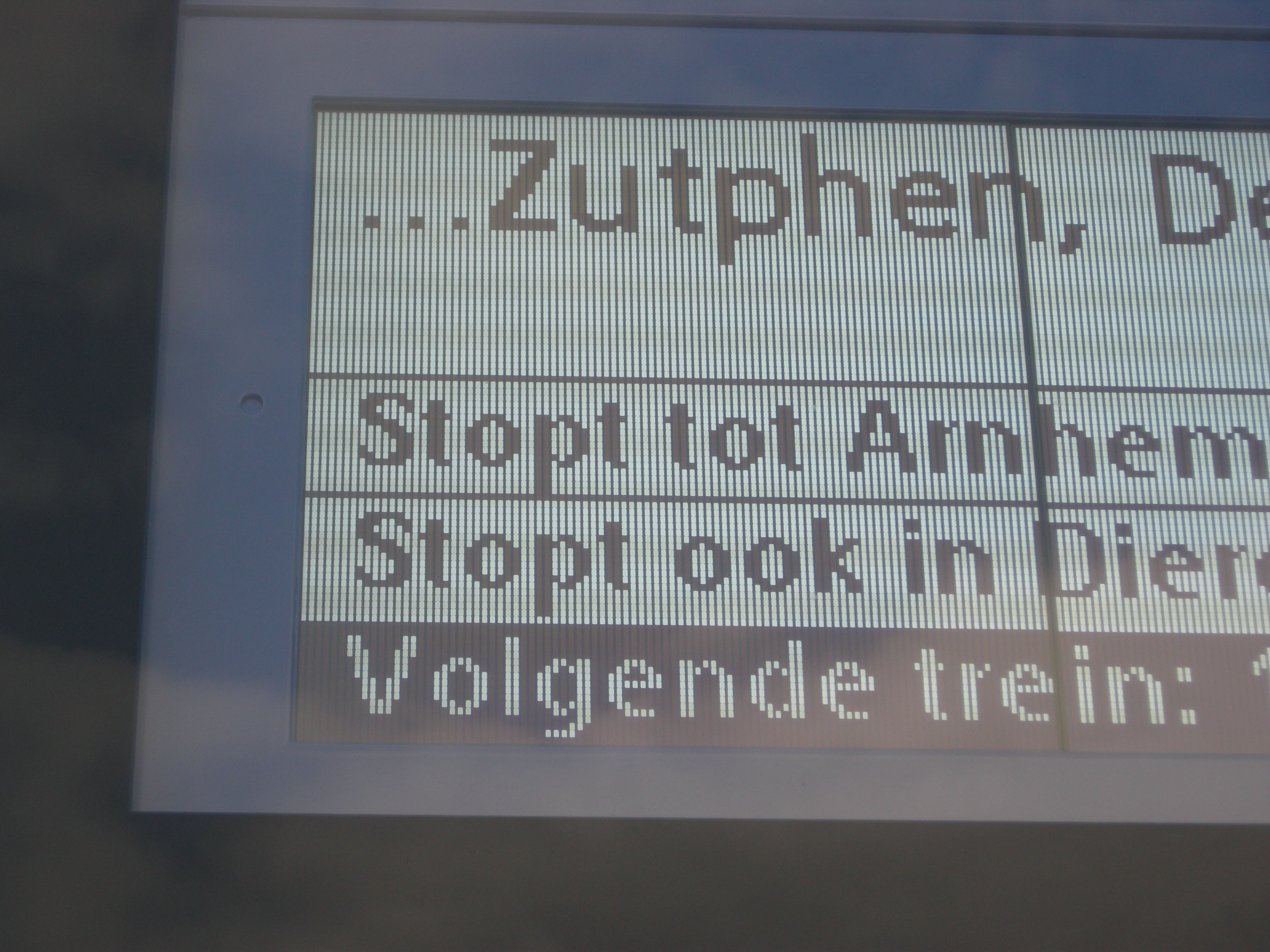 Monochroom lcd-scherm van 96×96 pixels op station Elst